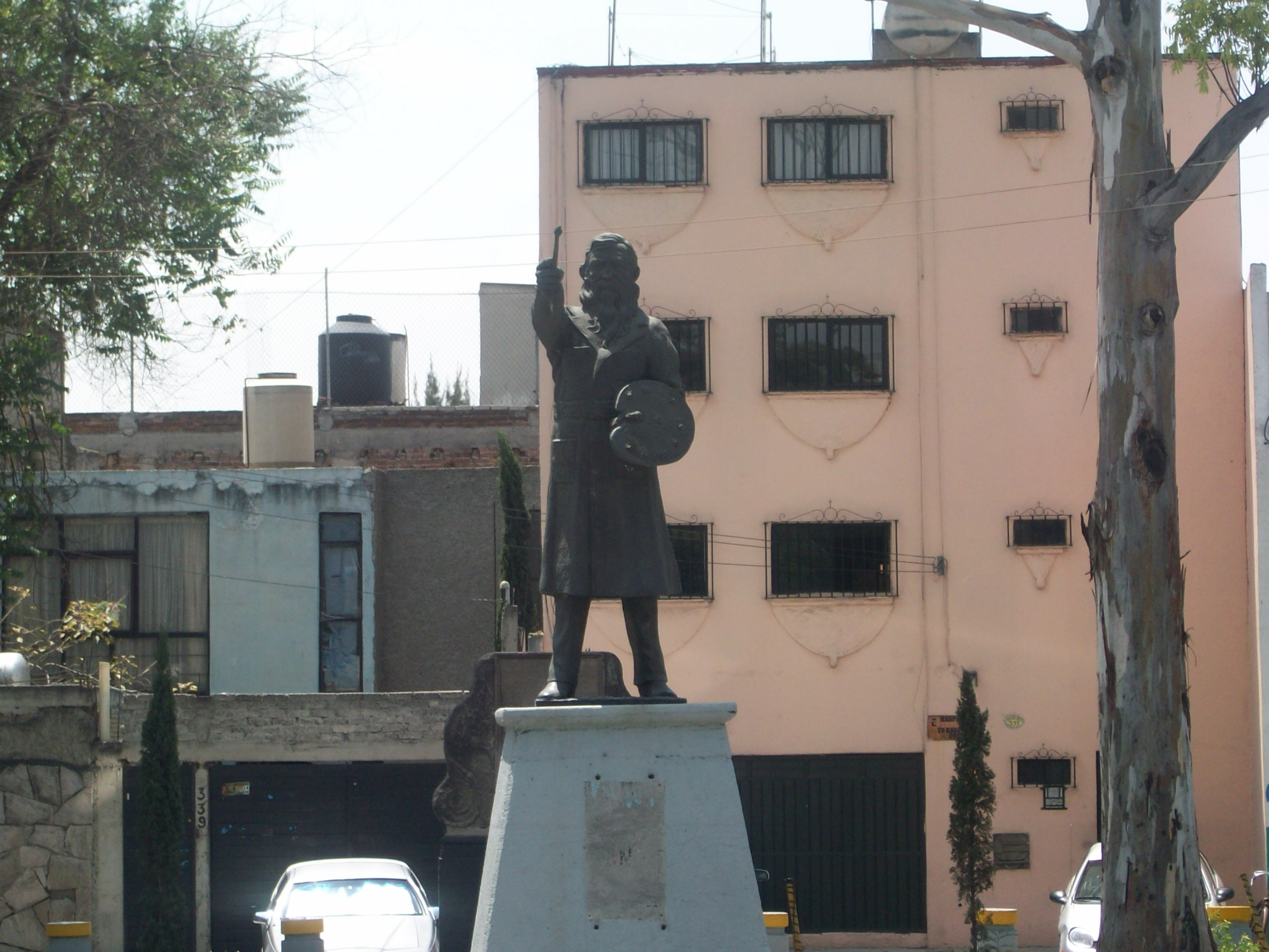 Fotografia del monumento a Jose Maria Velasco ubicado en Calzada de los Misterios